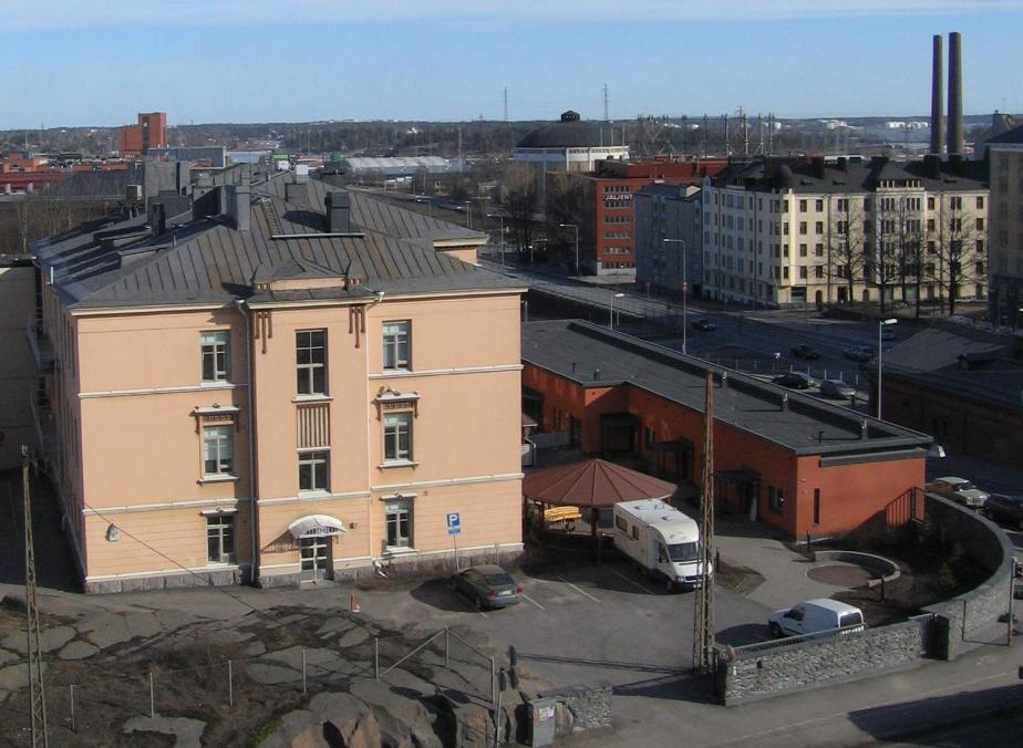 Old people's home Helena in Helsinki